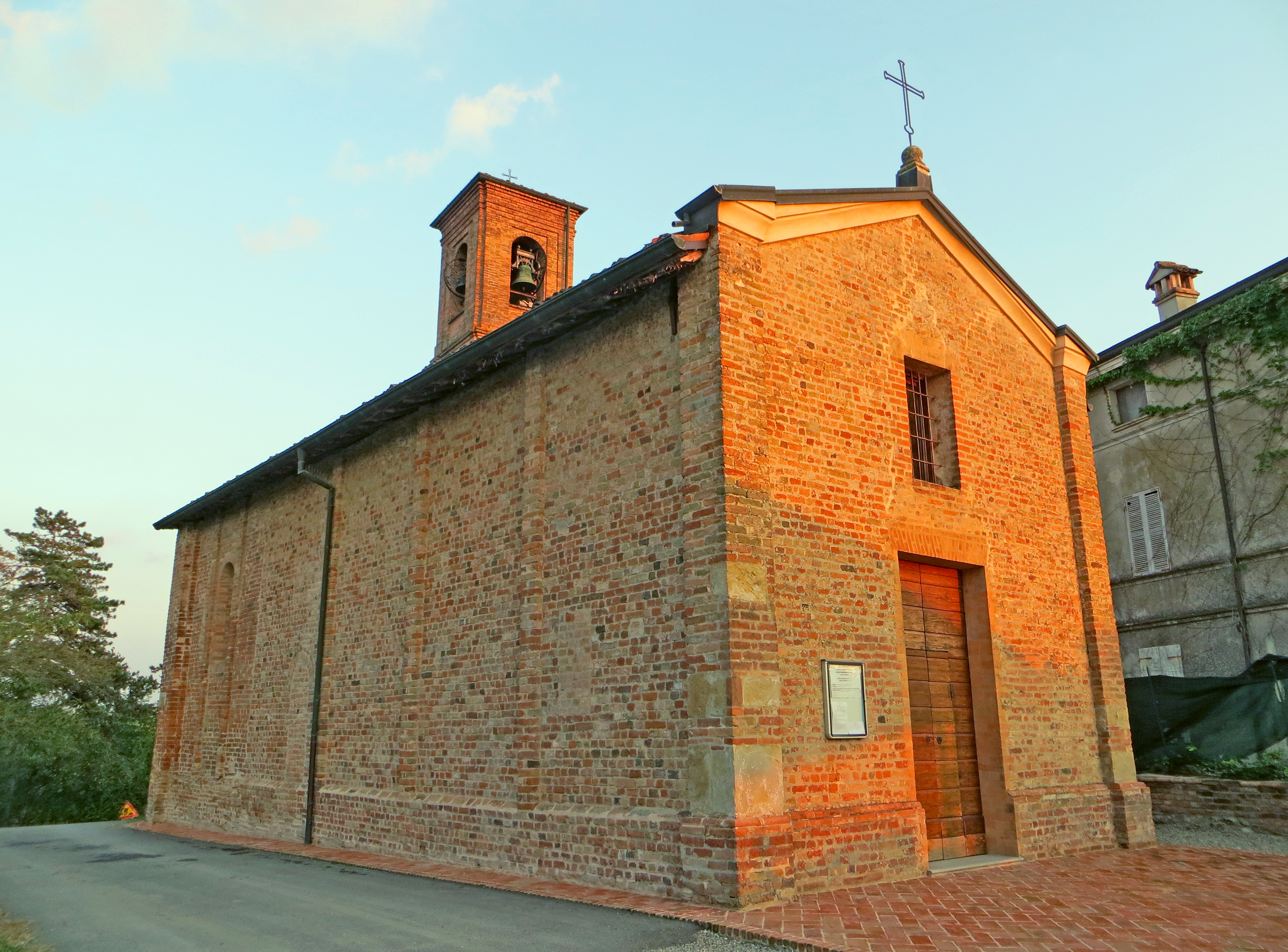 Chiesa di San Tommaso Becket (Cabriolo, Fidenza) - facciata e lato nord